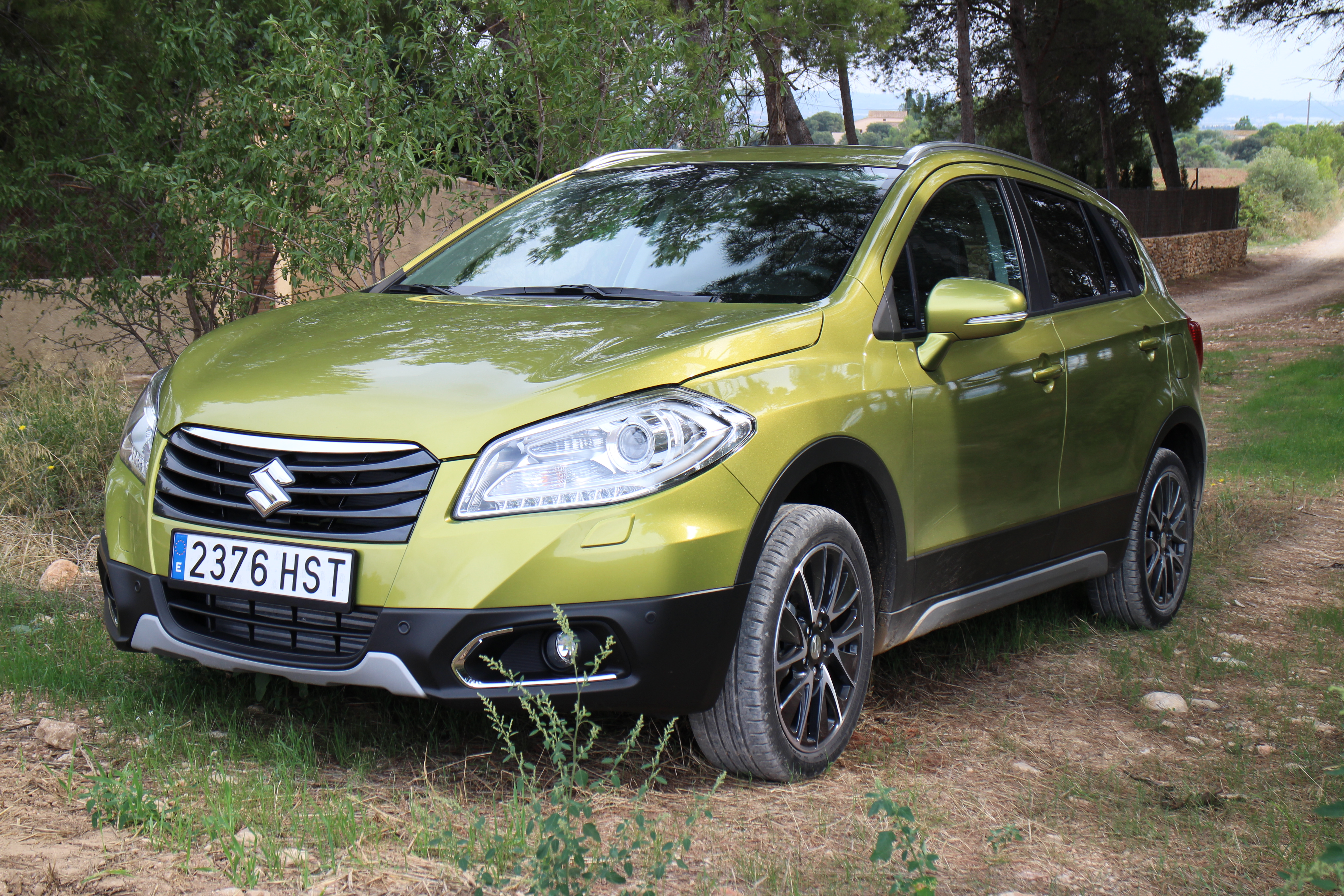 Suzuki SX4 S-Cross